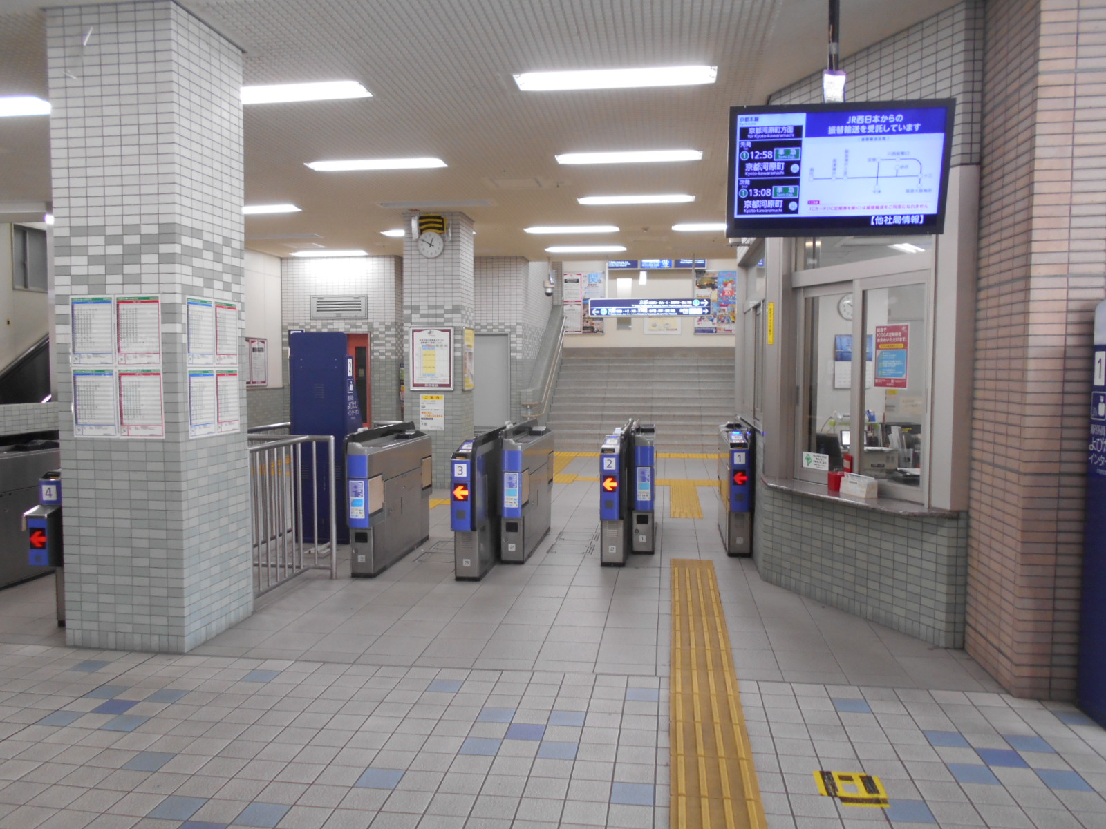 2019年12月撮影